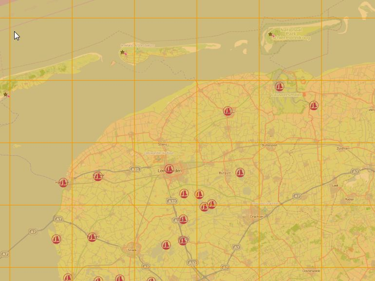 Regelmässiger Blattschnitt zur Kartendarstellung einer Fläche, Beispiel Nordseestrand.